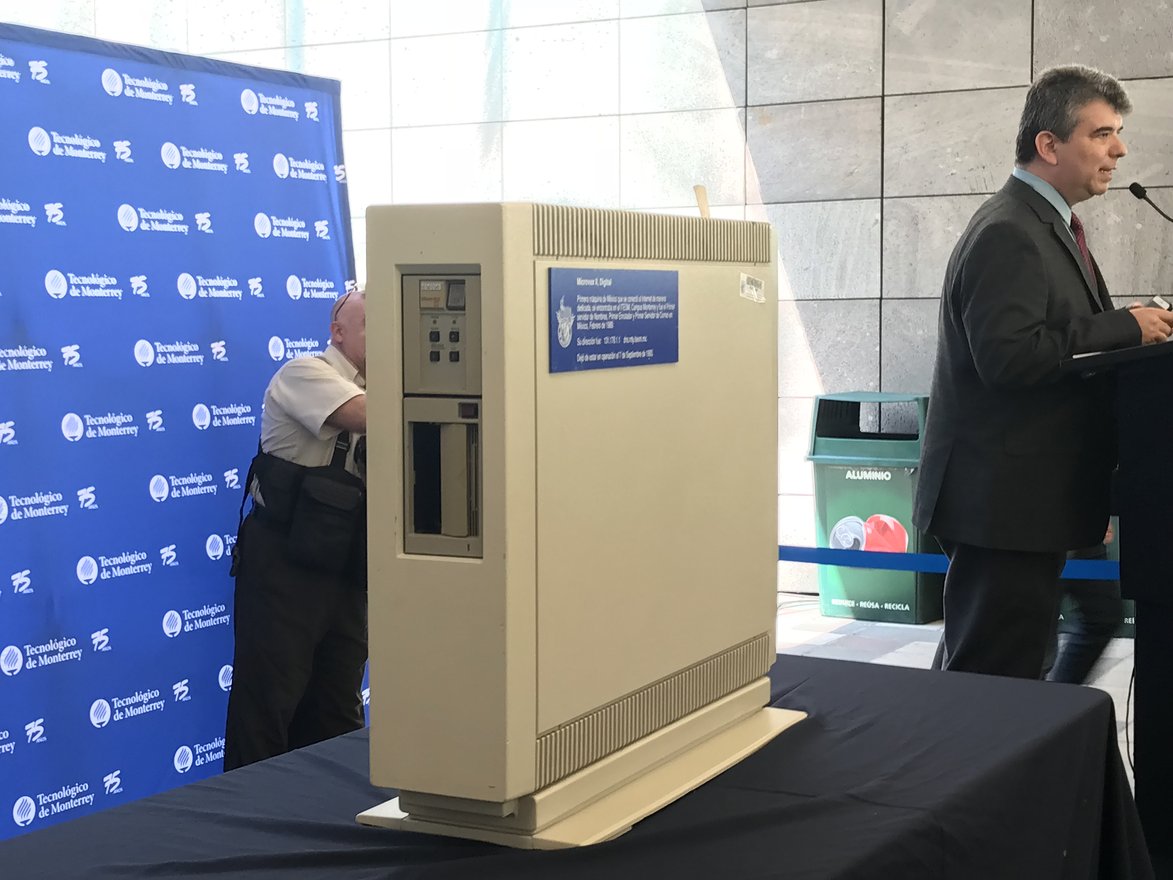 Computadora MicroVAX II en la biblioteca del ITESM Campus Monterrey, usada para conectar al ITESM a la Red de Educación Superior de Texas -THENET